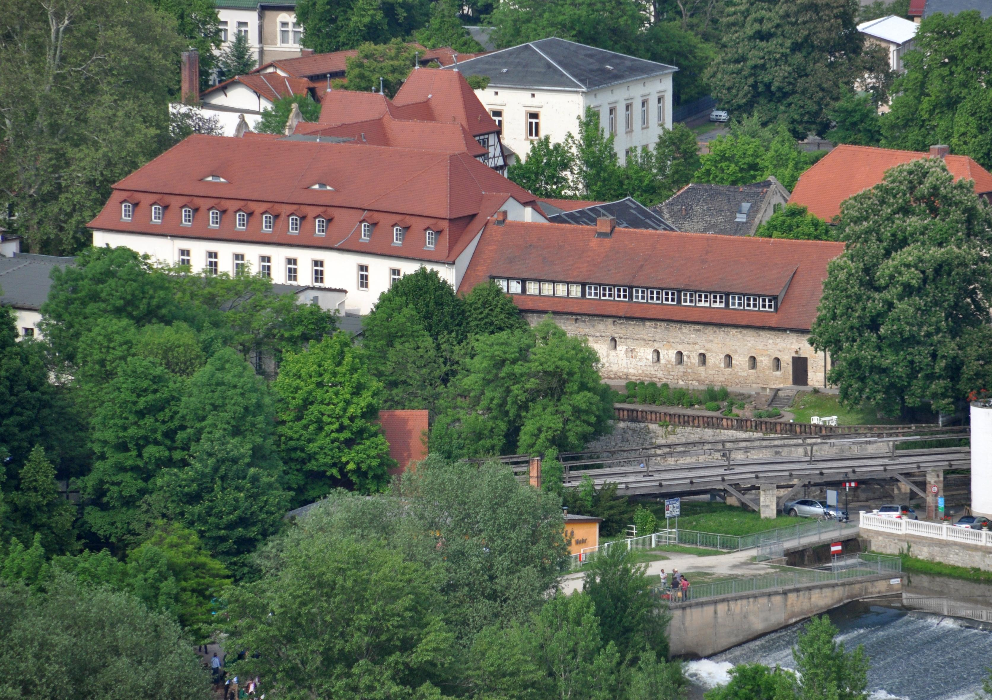 Der Mutiger Ritter (links, weiße Wand mit rotem Dach) und das direkt angebaute Romanische Haus (rechts) in Bad Kösen. Darunter das Kunstgestänge von der Radinsel zum Borlachschacht, ganz unten die Saale.